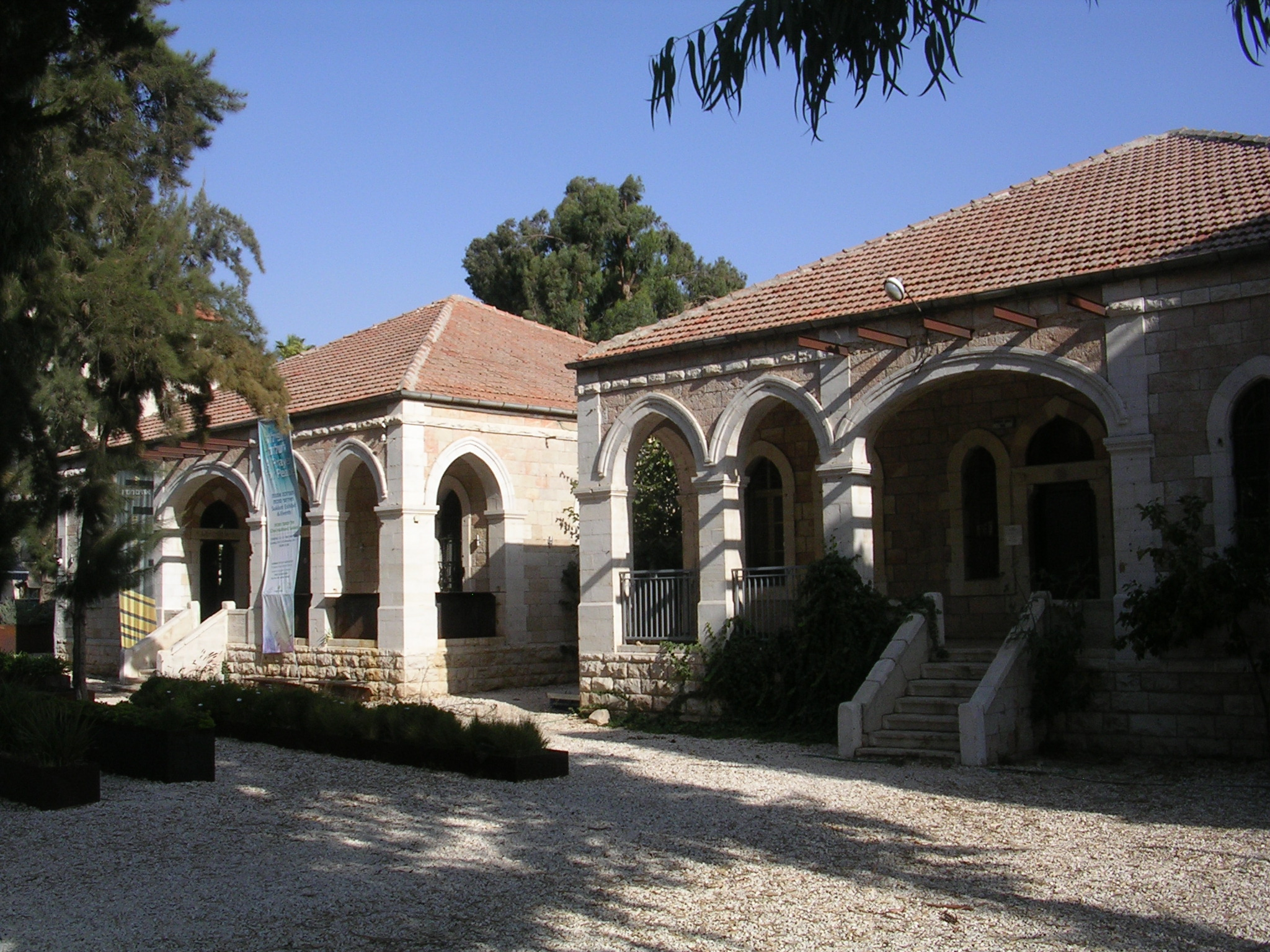 מעון ניב הוא מתחם של שלושה מבנים חד-קומתיים ברחוב עמק רפאים בירושלים, ששימש עד 2005 מעון לילדים חירשים ונערות חוסות. נבנה בסוף שנות ה-20 על מתחם של 3.6 דונם. כיום המתחם נטוש ומיועד להקמת מרכזי פנאי ומלון בוטיק.